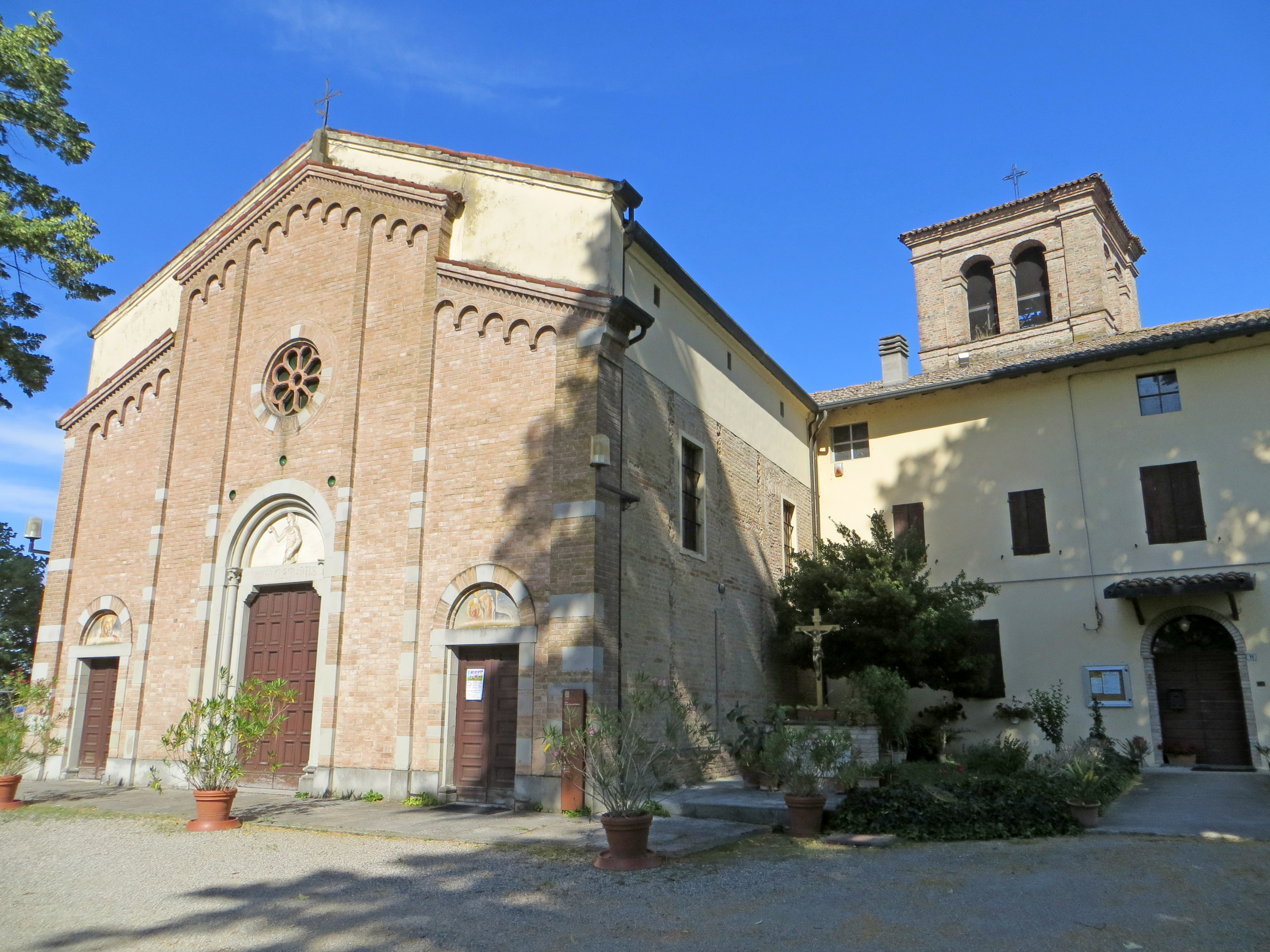 Pieve di San Giovanni Battista (Gainago, Torrile) - facciata e canonica